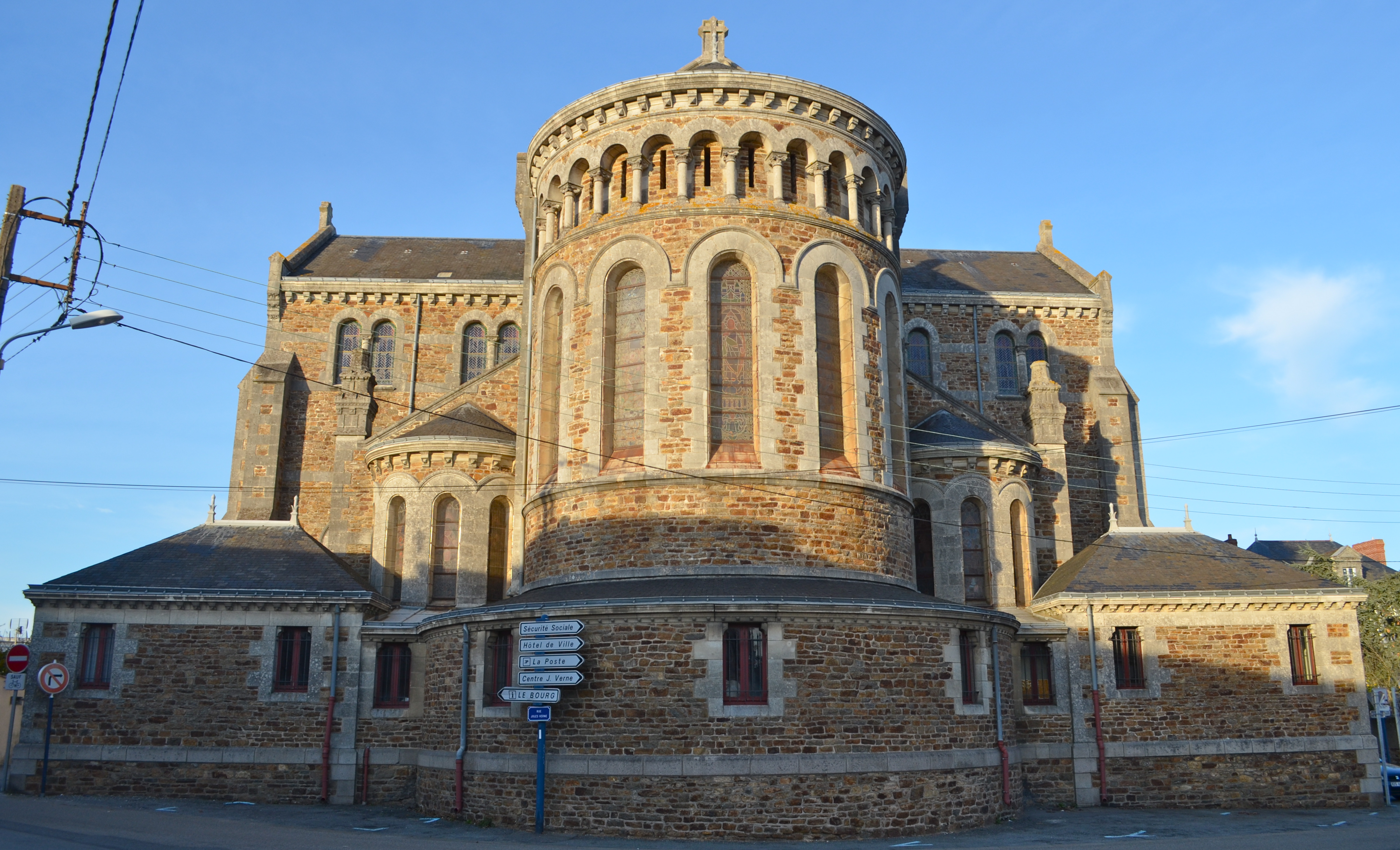 Eglise Saint-Pierre - Bouguenais (Loire-Atlantique)